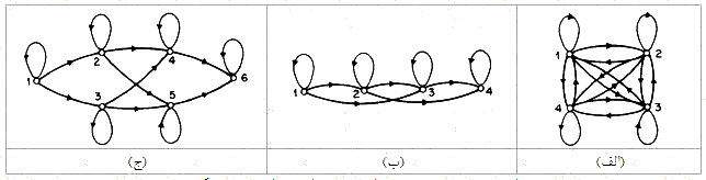 شکل 2: سه ساختار براي مدل اچ ام ام